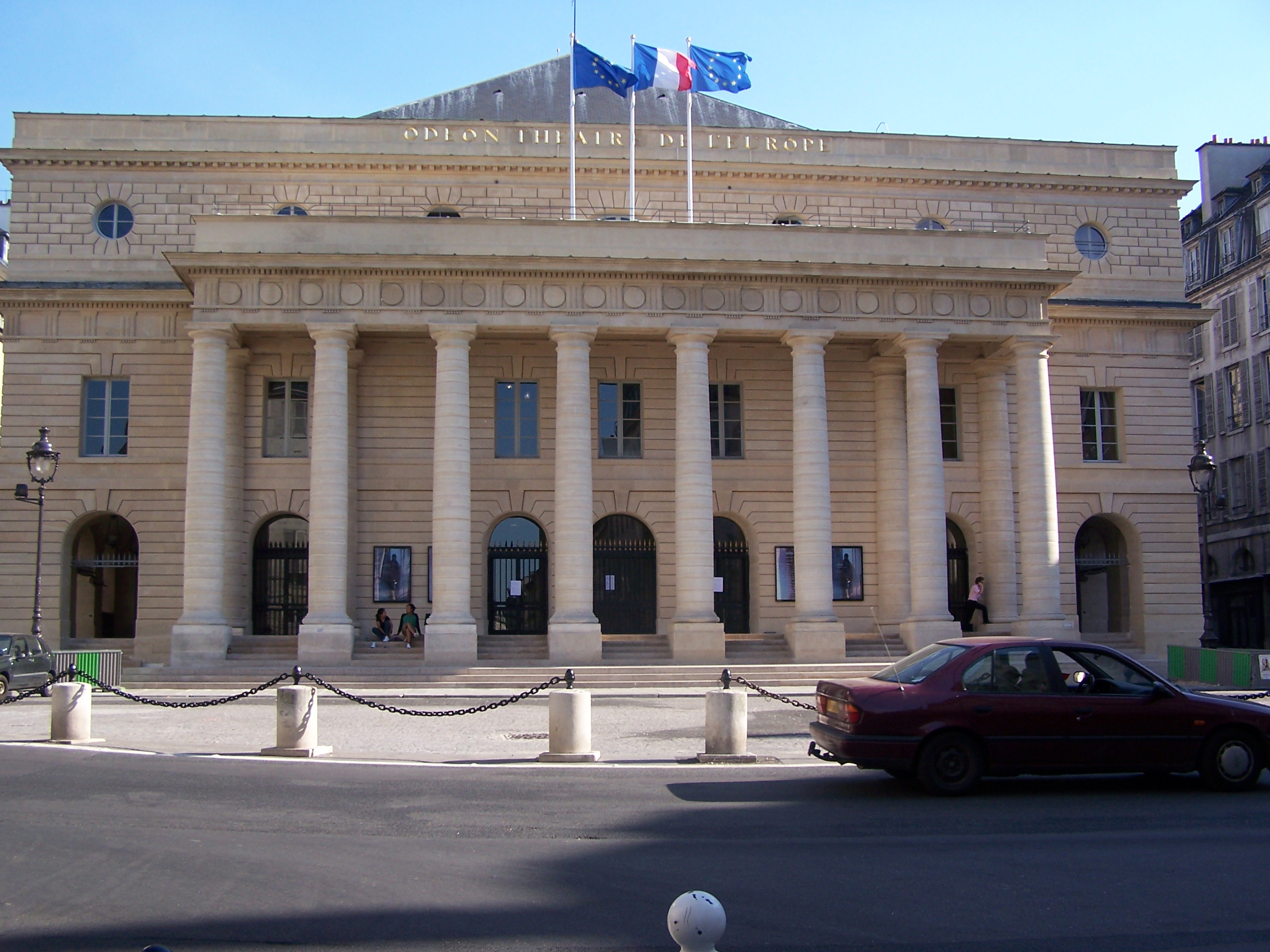 Théâtre de l'Odéon